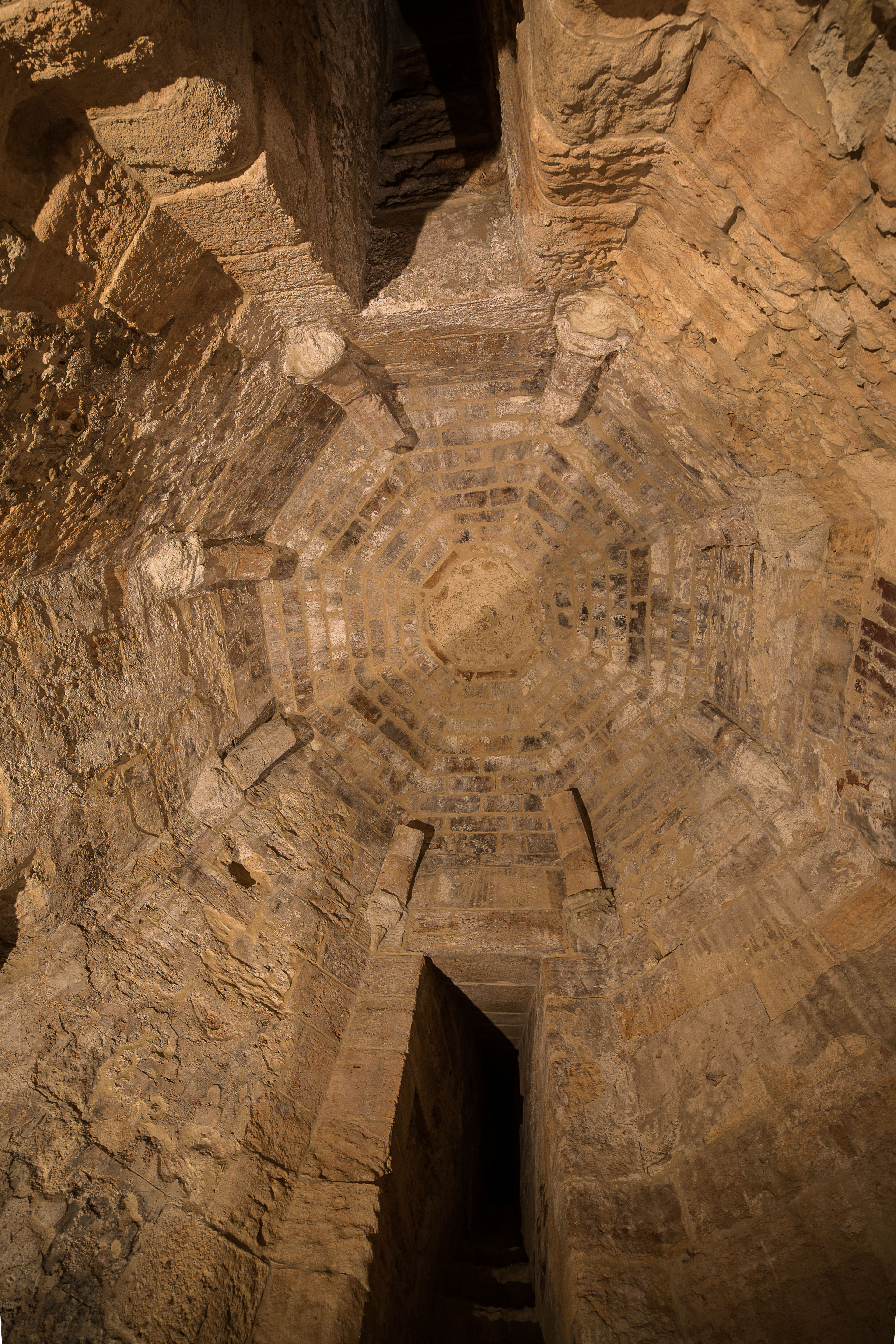 Castello Svevo This is a photo of a monument which is part of cultural heritage of Italy.